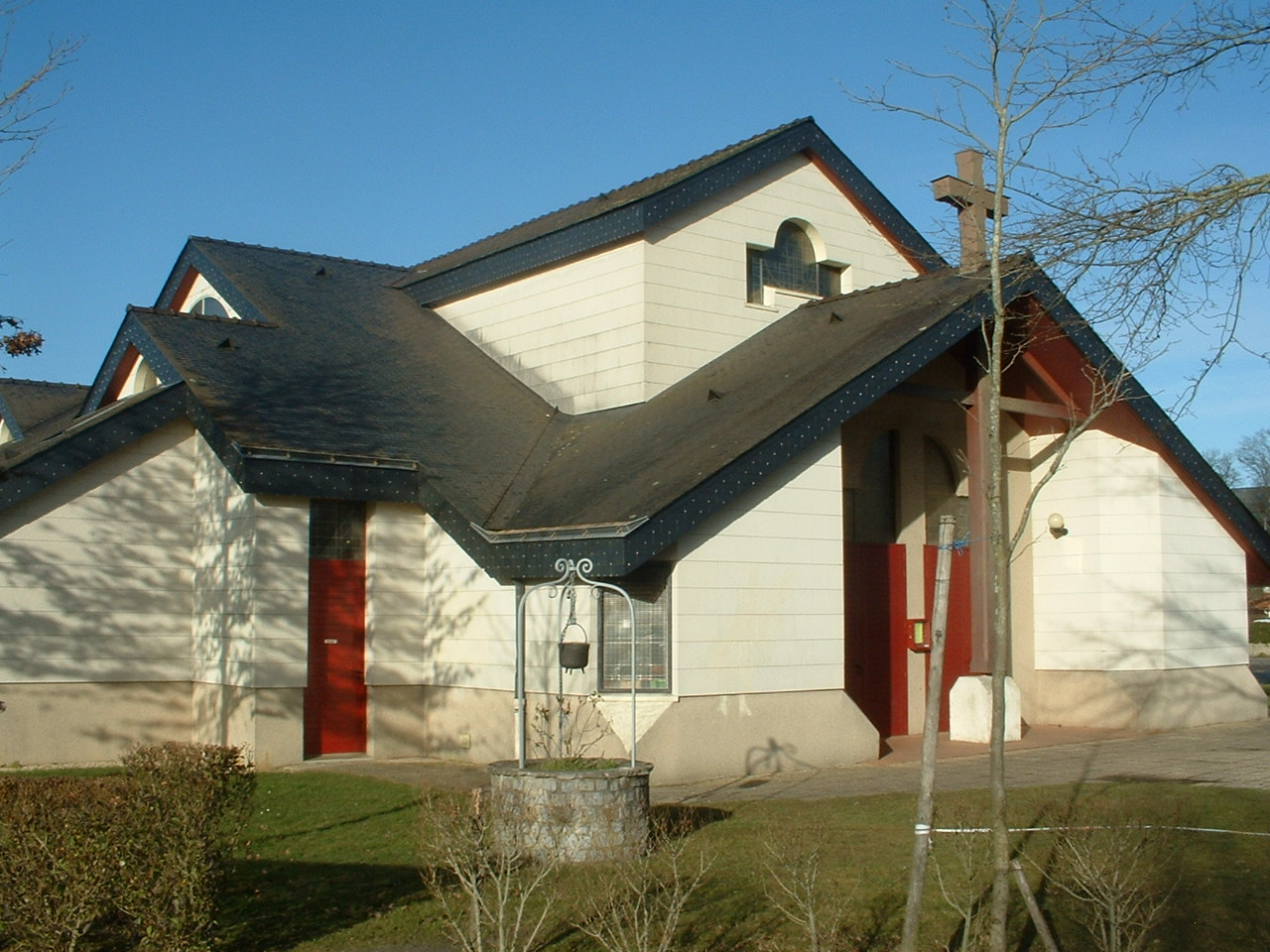 Rezé - chapelle Saint André